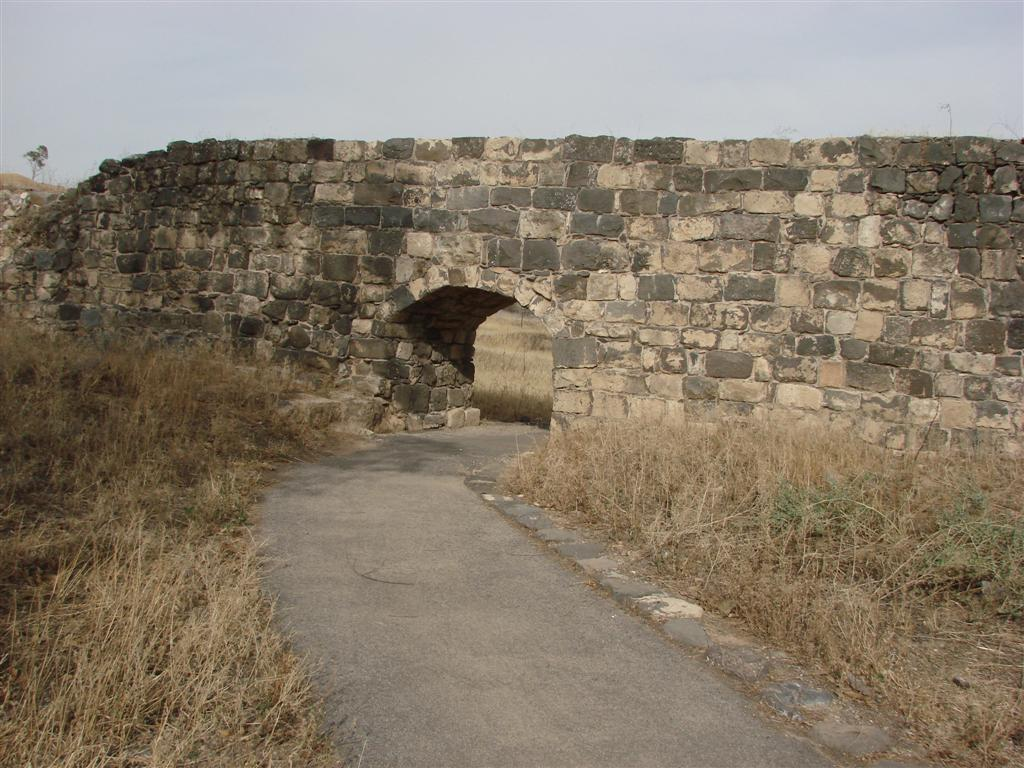 גשר הרכבת העליון בנחל חרוד 2